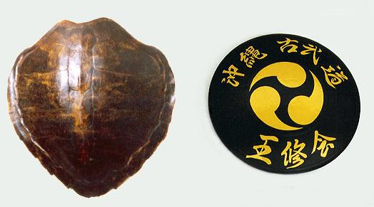 Photos de deux boucliers traditionnels d'Okinawa, appelés "Timbe" utilisé dans les Kobudo